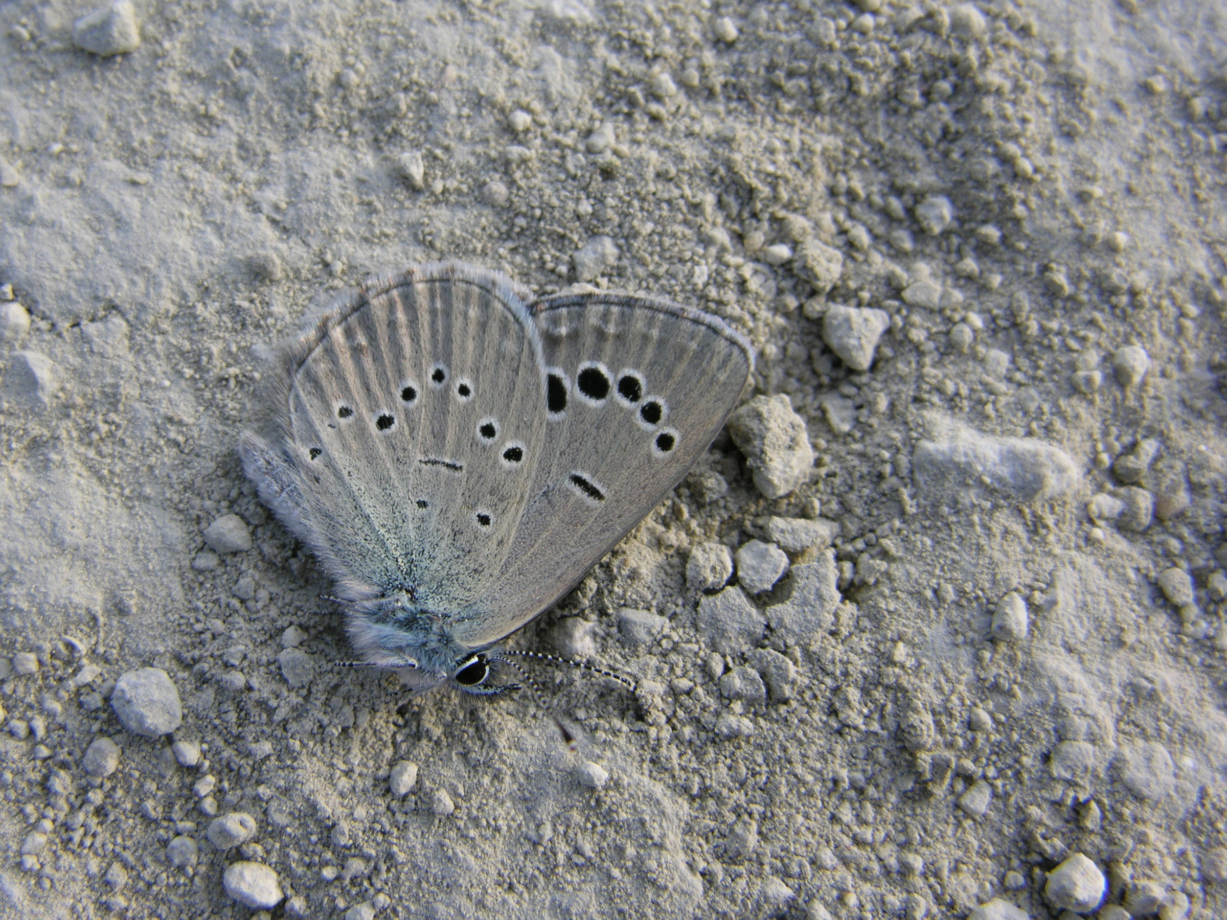 Glaucopsyche melanops (Lycaenidae). Rivas Vaciamadrid, Madrid, España. Interesante comportamiento el de esta mariposa, que se hacía pasar por muerta mientras la fotografiaba...